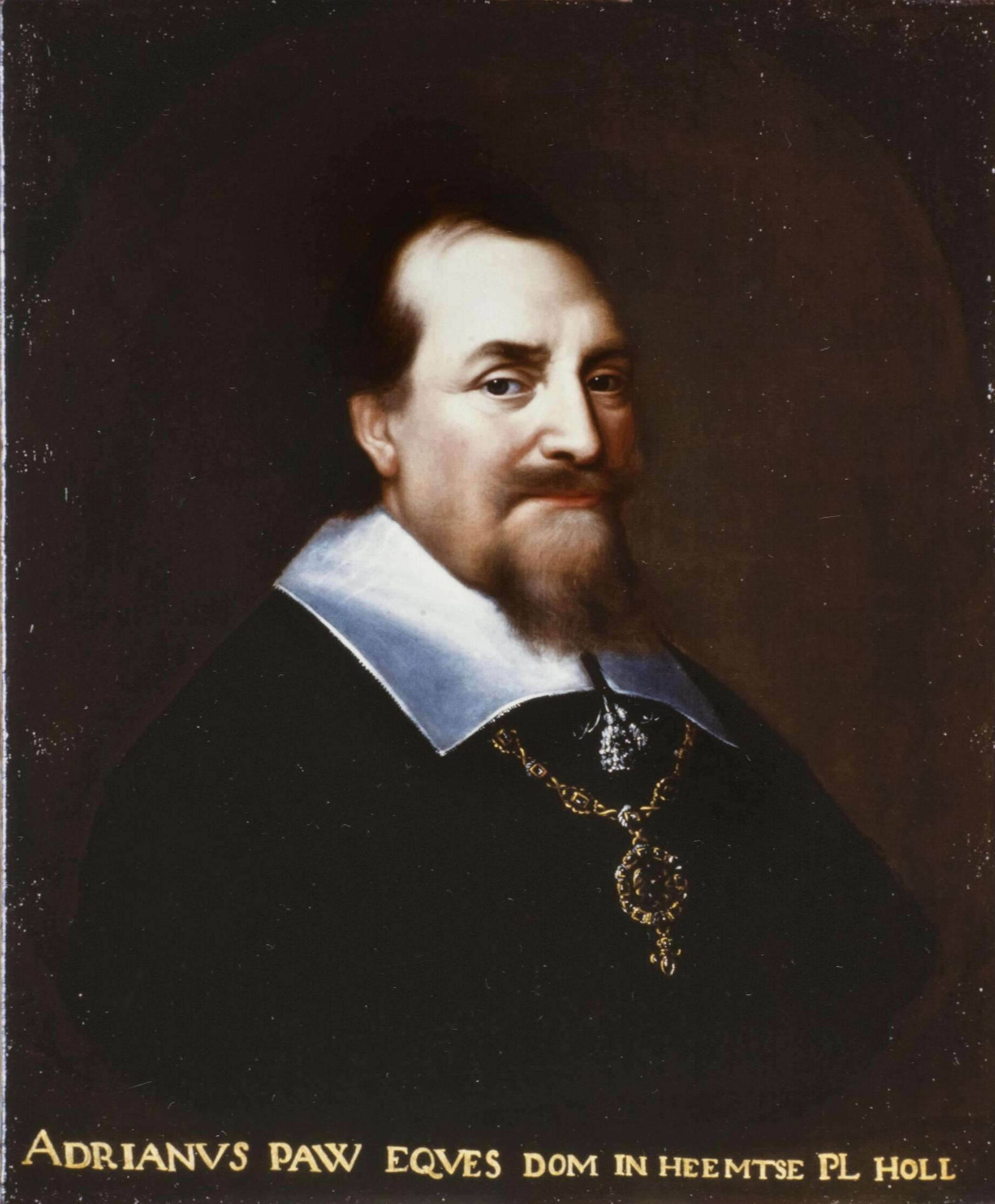 Portret van Adriaan Pauw (1585-1653), 1648-1649 Münster, Historisches Rathaus Münster (Friedenssaal)